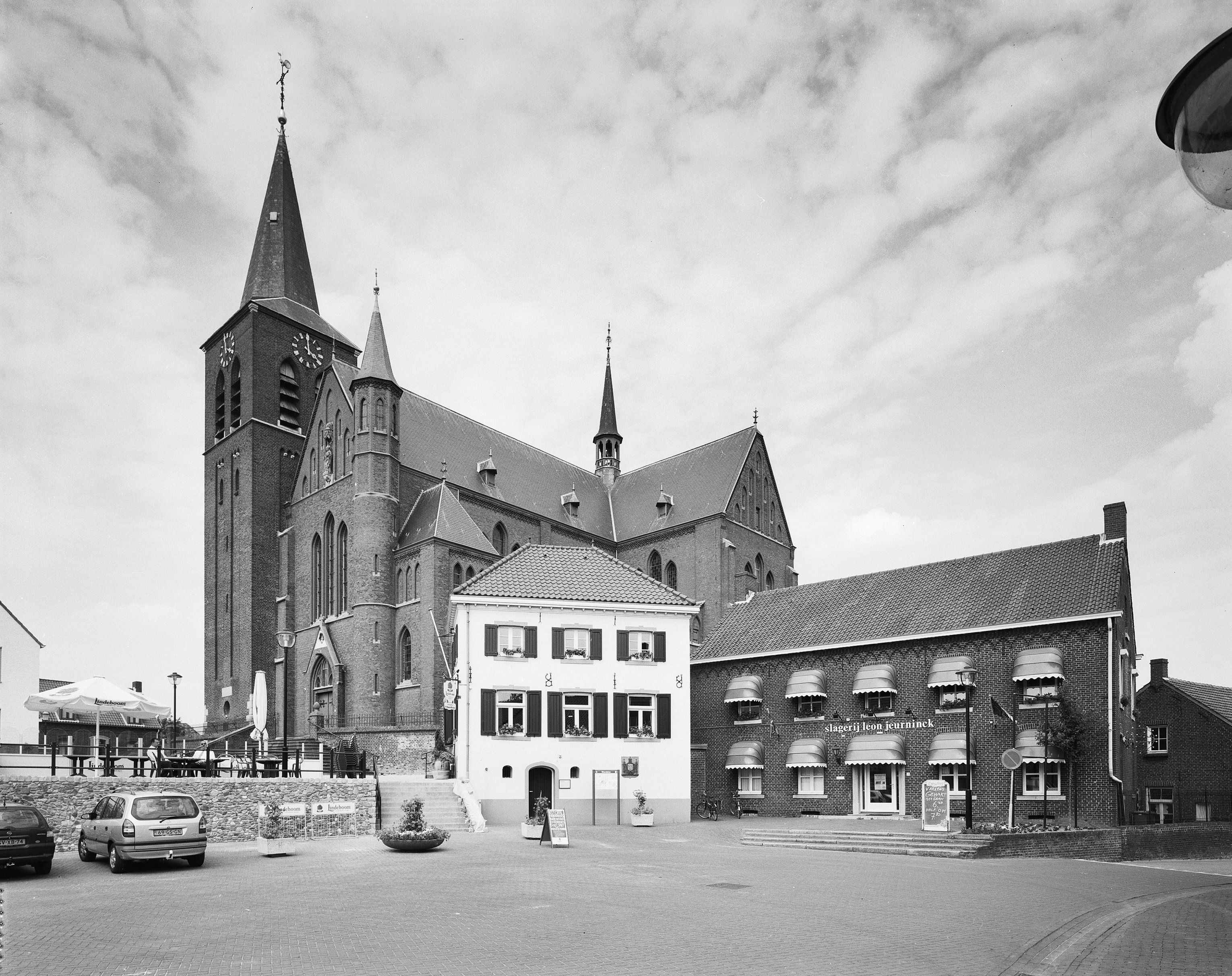 Sint Martinuskerk: Overzicht zuidwestgevel met kerktoren en voorgevel voormalig raadhuis (opmerking: Gefotografeerd voor Monumenten In Nederland Limburg)